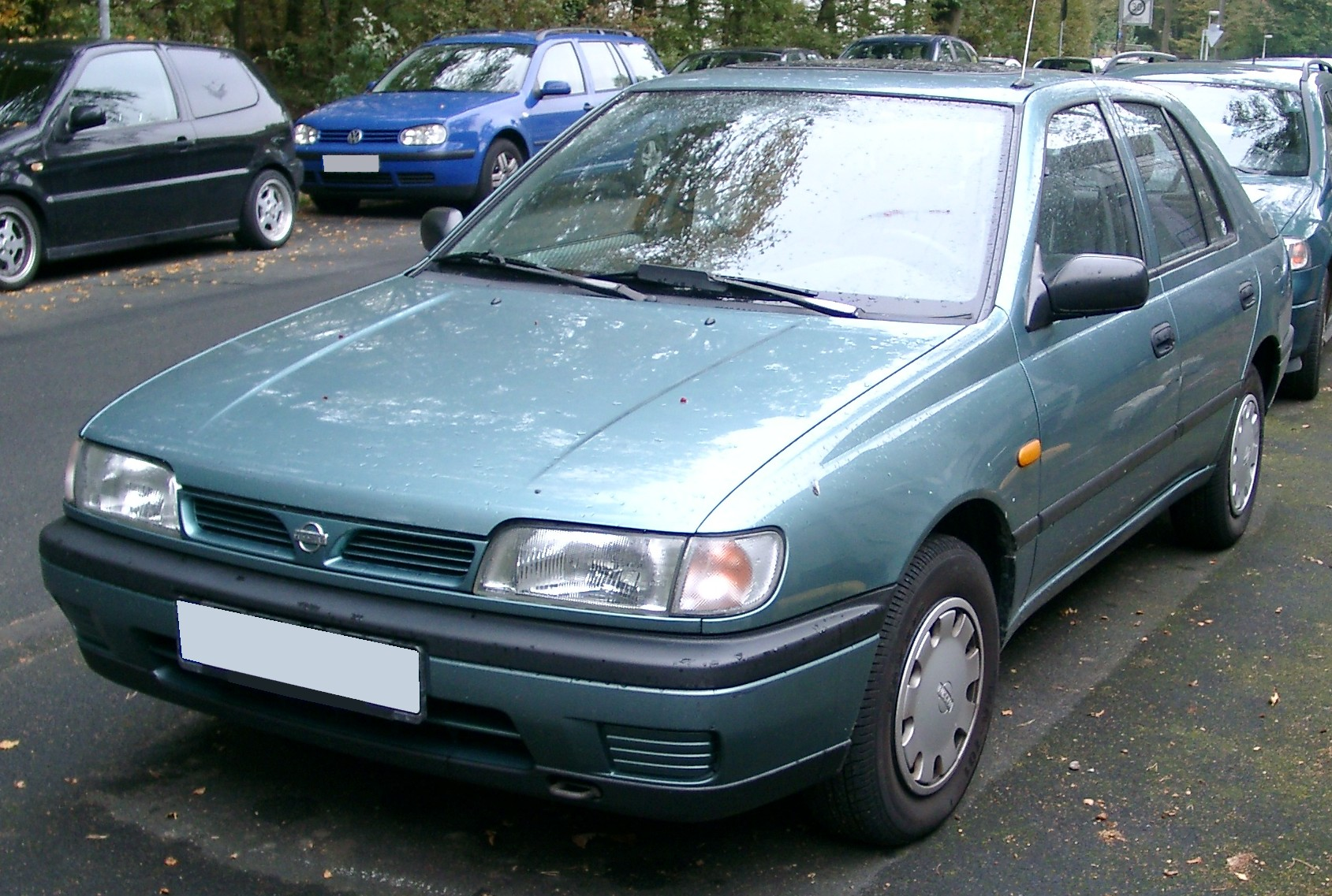 Nissan Sunny